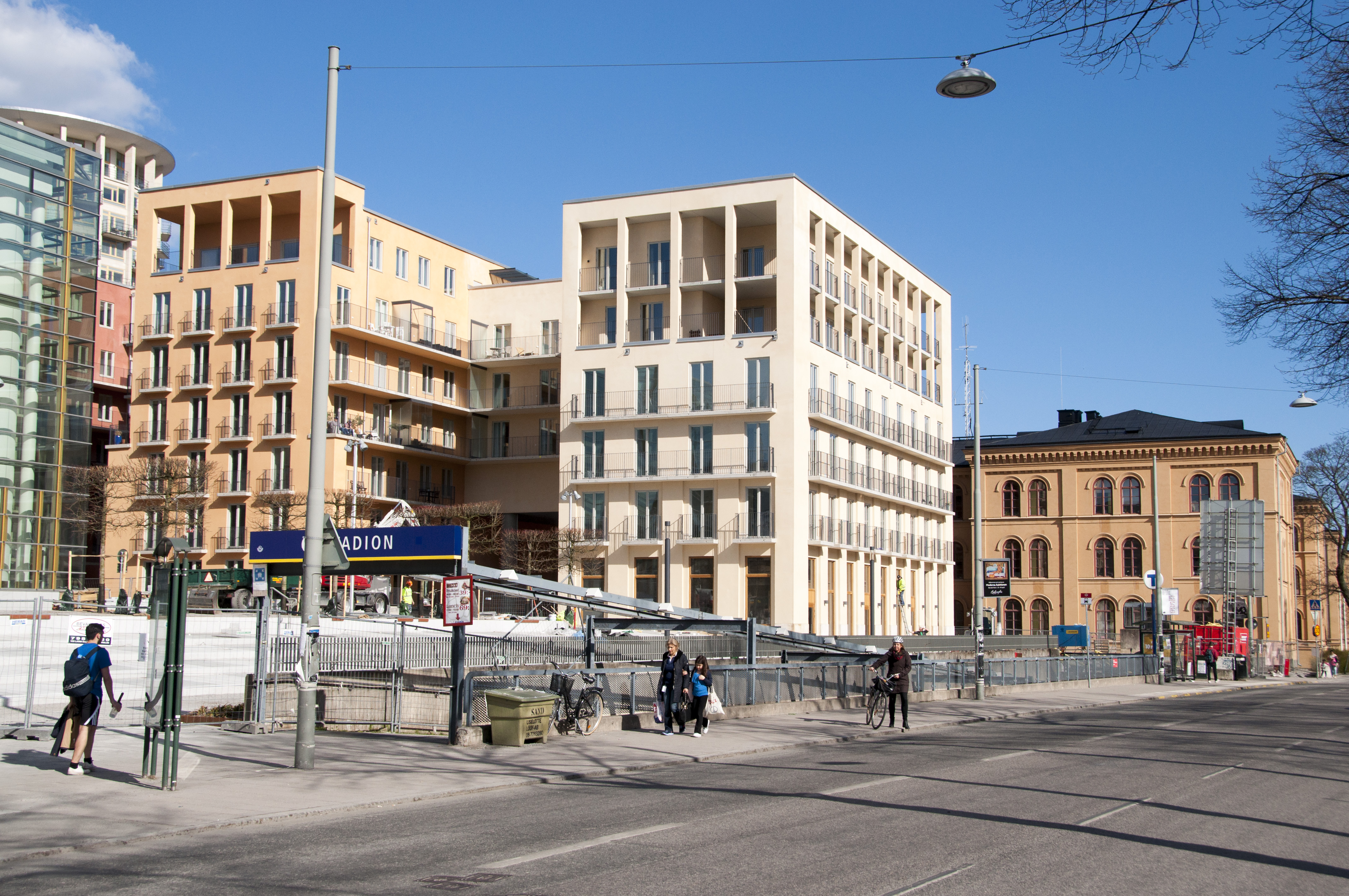 Svea Fanfar, Melodislingan (Valhallavägen/Lidingövägen) Stockholm Byggnadsår 2013-15 Byggherre: Etapp 1: Veidekke Bostad AB, Panorama och CA Fastigheter Arkitekt: Brunnberg & Forshed Ägare: BRF Svea Fanfar